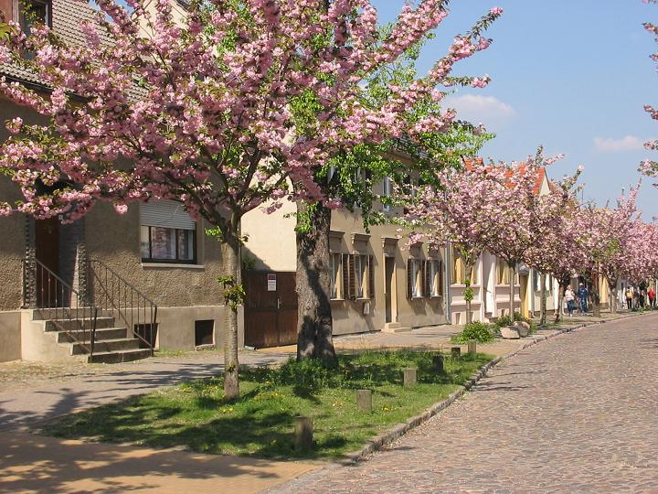 Werder, Stadtkern bei Baumblüte